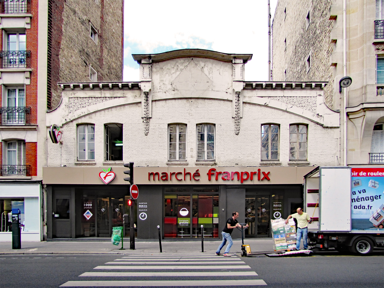 Supermarché Marché Franprix, dans les locaux d'une ancienne agence Ford des années 1920, au 272, rue de Vaugirard, 15e arrondissement de Paris.